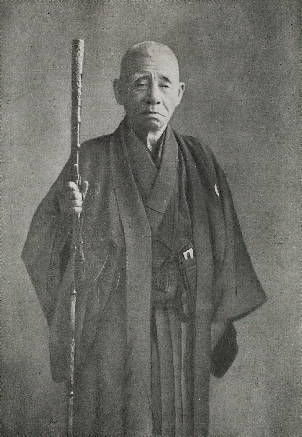 Portrait of Mikimoto Kokichi (御木本幸吉, 1858 – 1954)